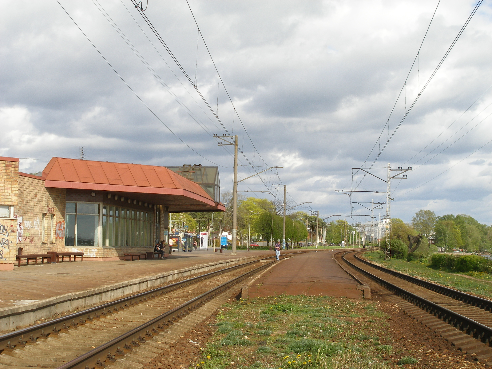 Majoru stacijas sliežu ceļi un peroni.